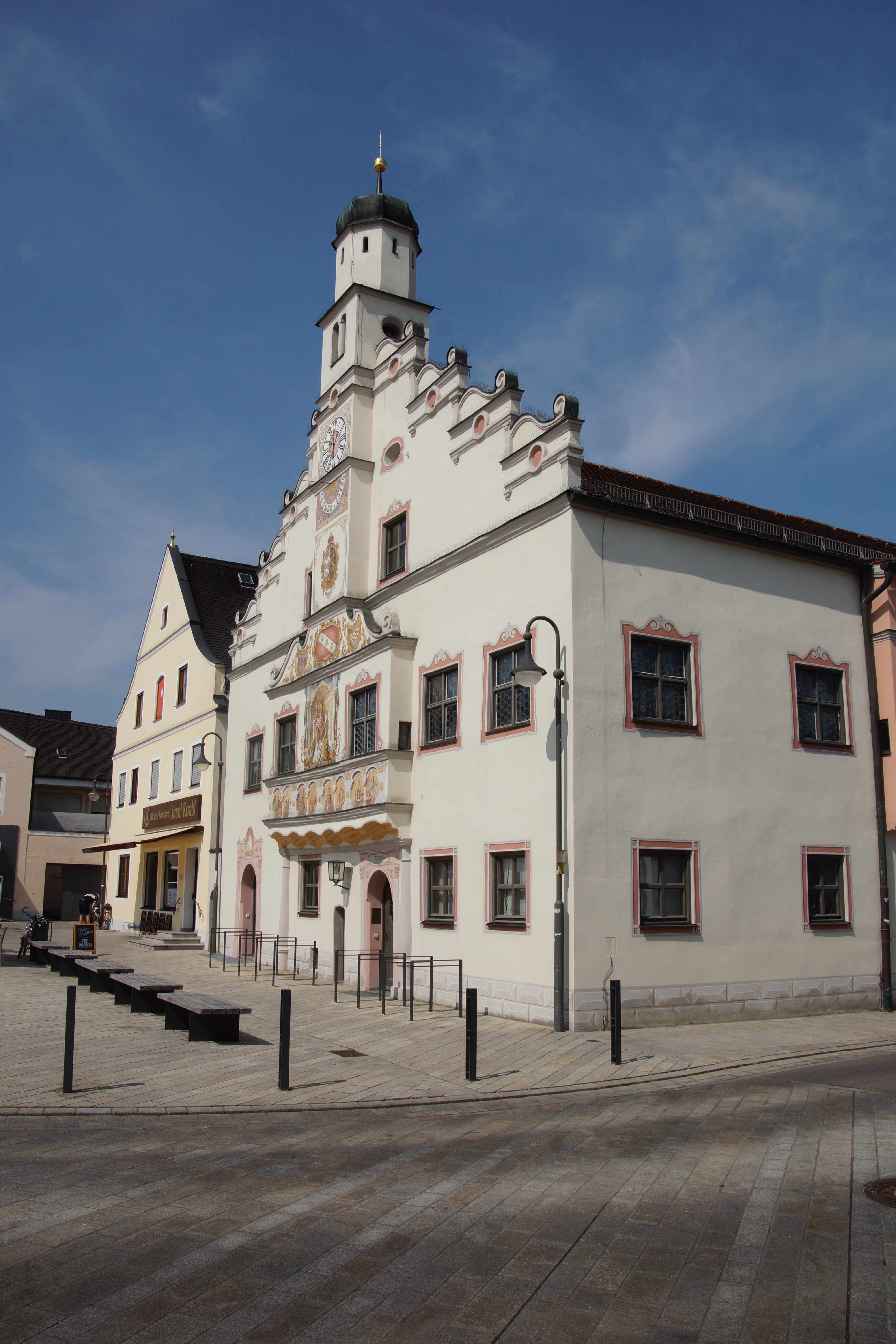 Gaimersheim bei Ingolstadt